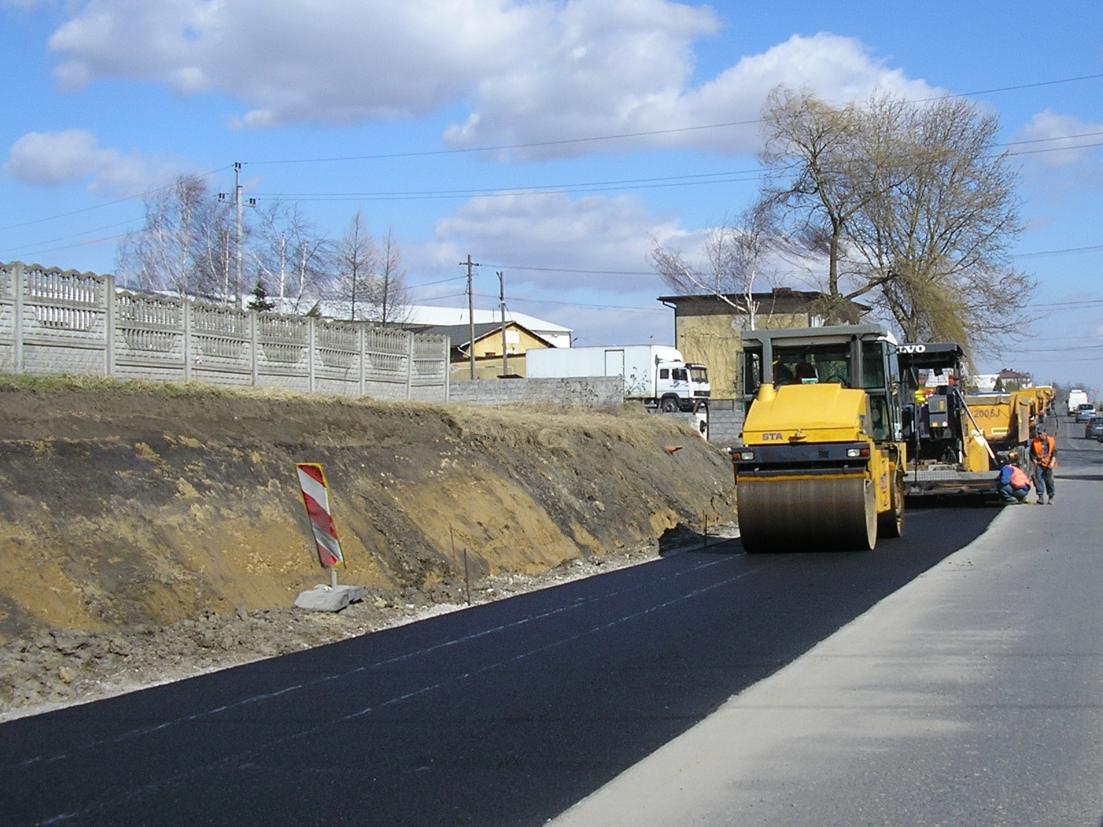 Droga Wojewódzka 776 w trakcie przebudowy. W trakcie układania warstwy wiążącej. Posądza